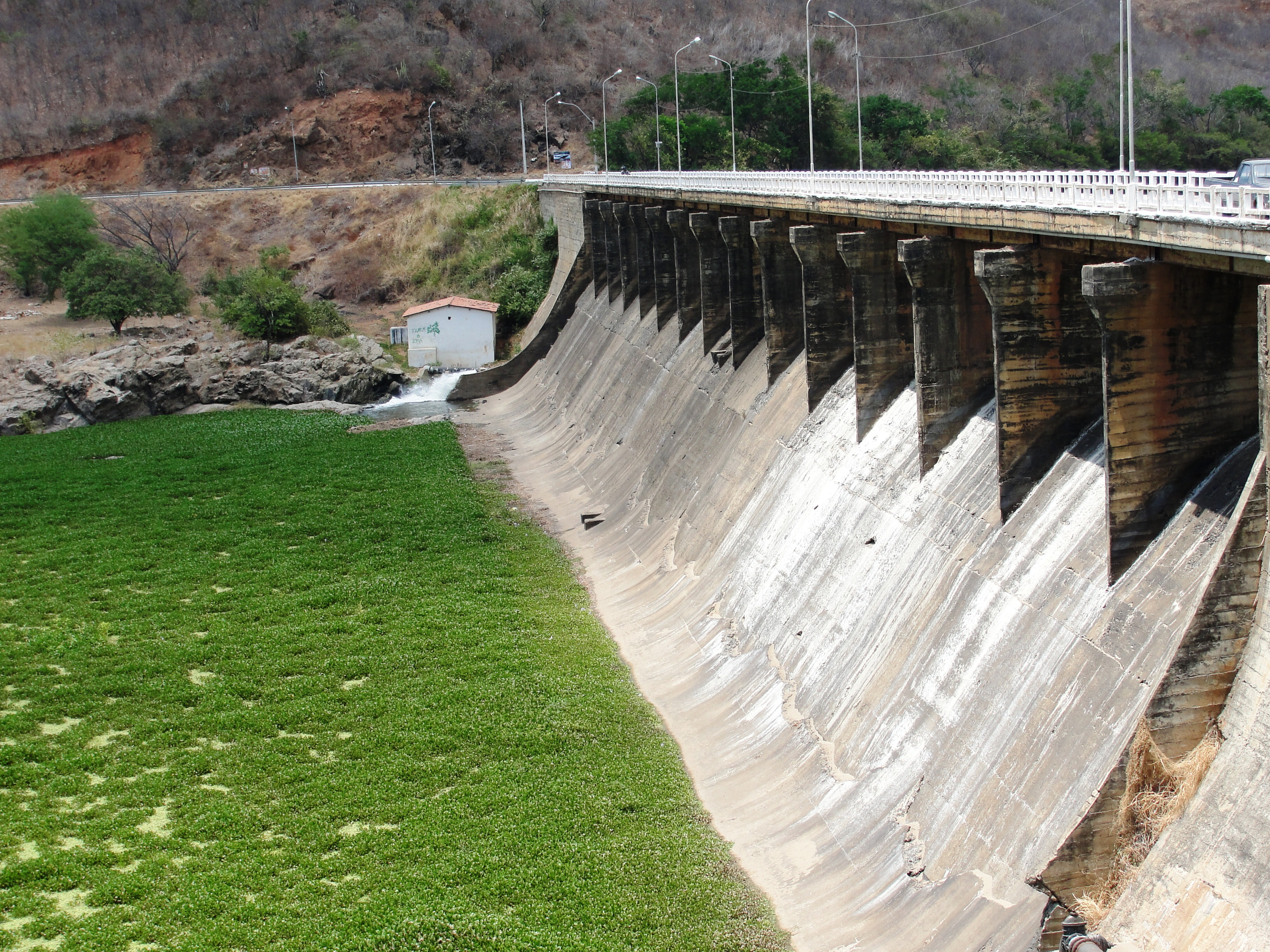 Barragem de Quixeramobim quando não se encontra sangrando